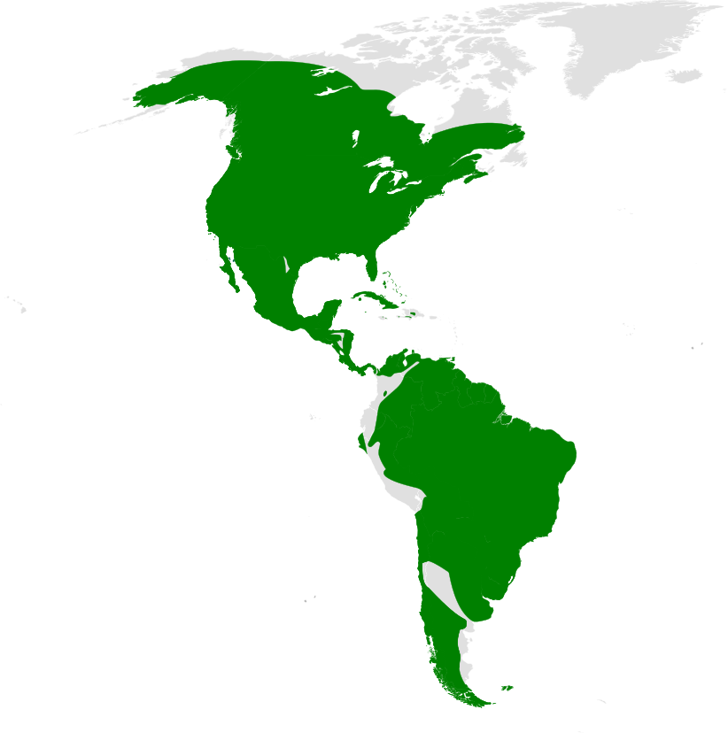 Tachycineta distribution map